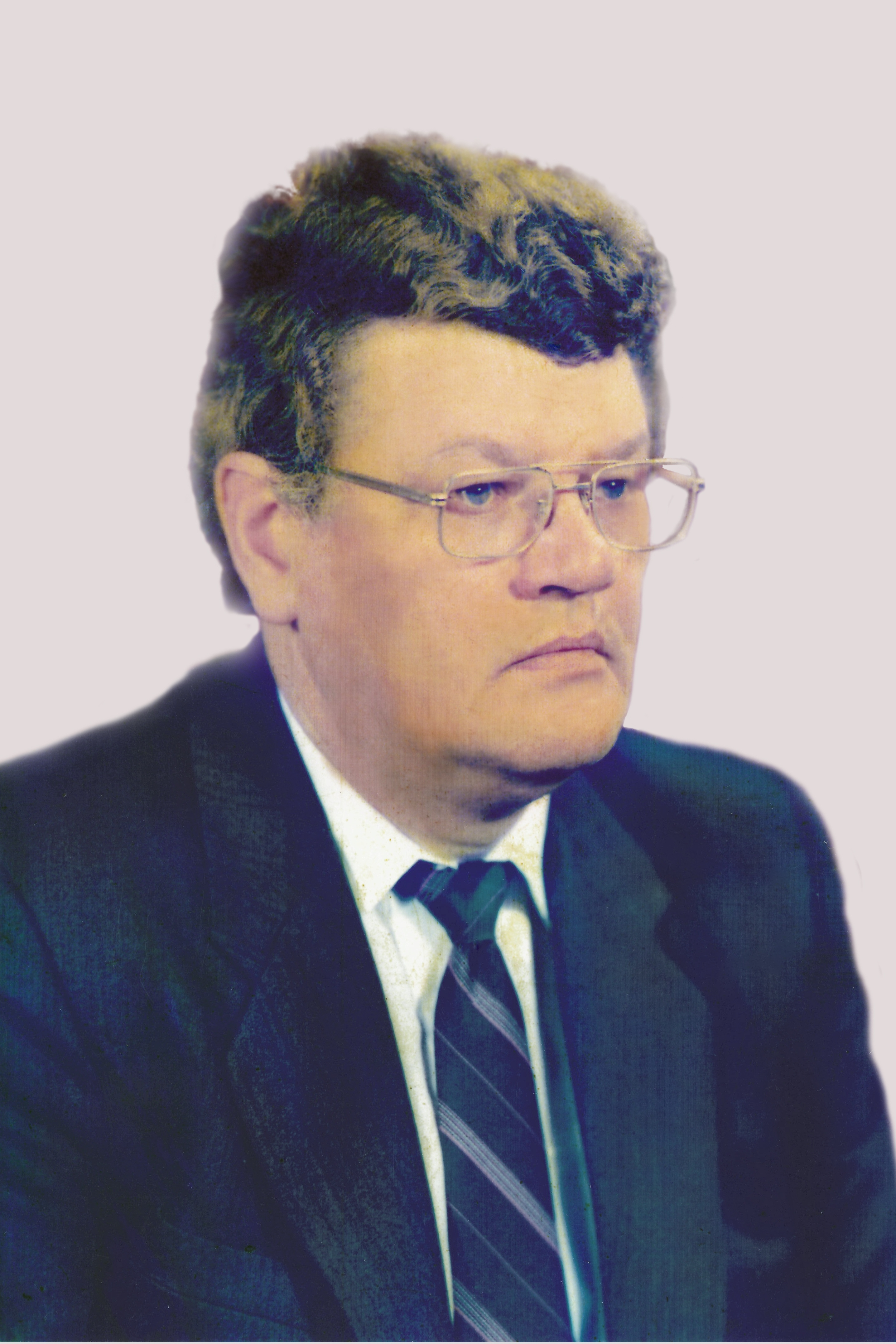 Таран Віталій Михайлович